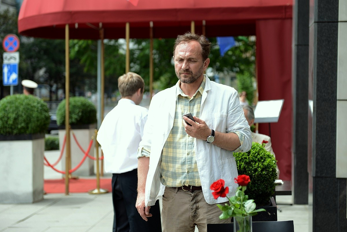 Andrzej Chyra na planie filmu "11 minut".